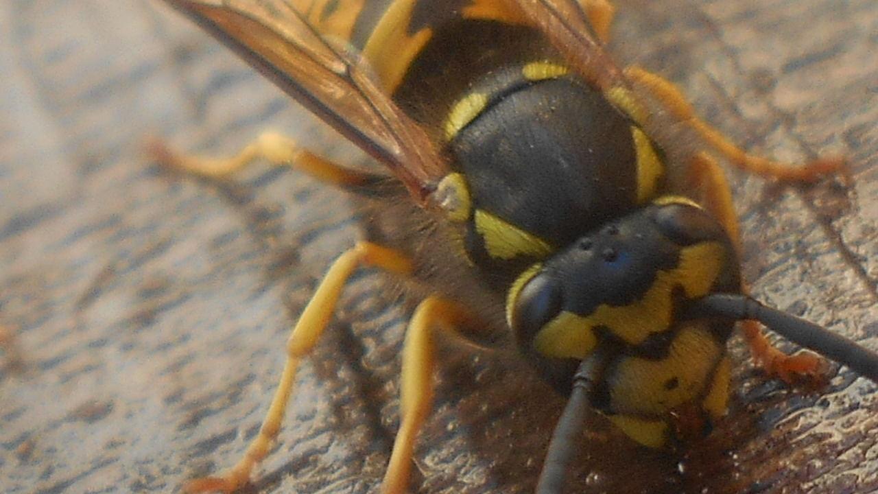 Hlava dělnice vosy útočné a čelní štítek v detailním pohledu